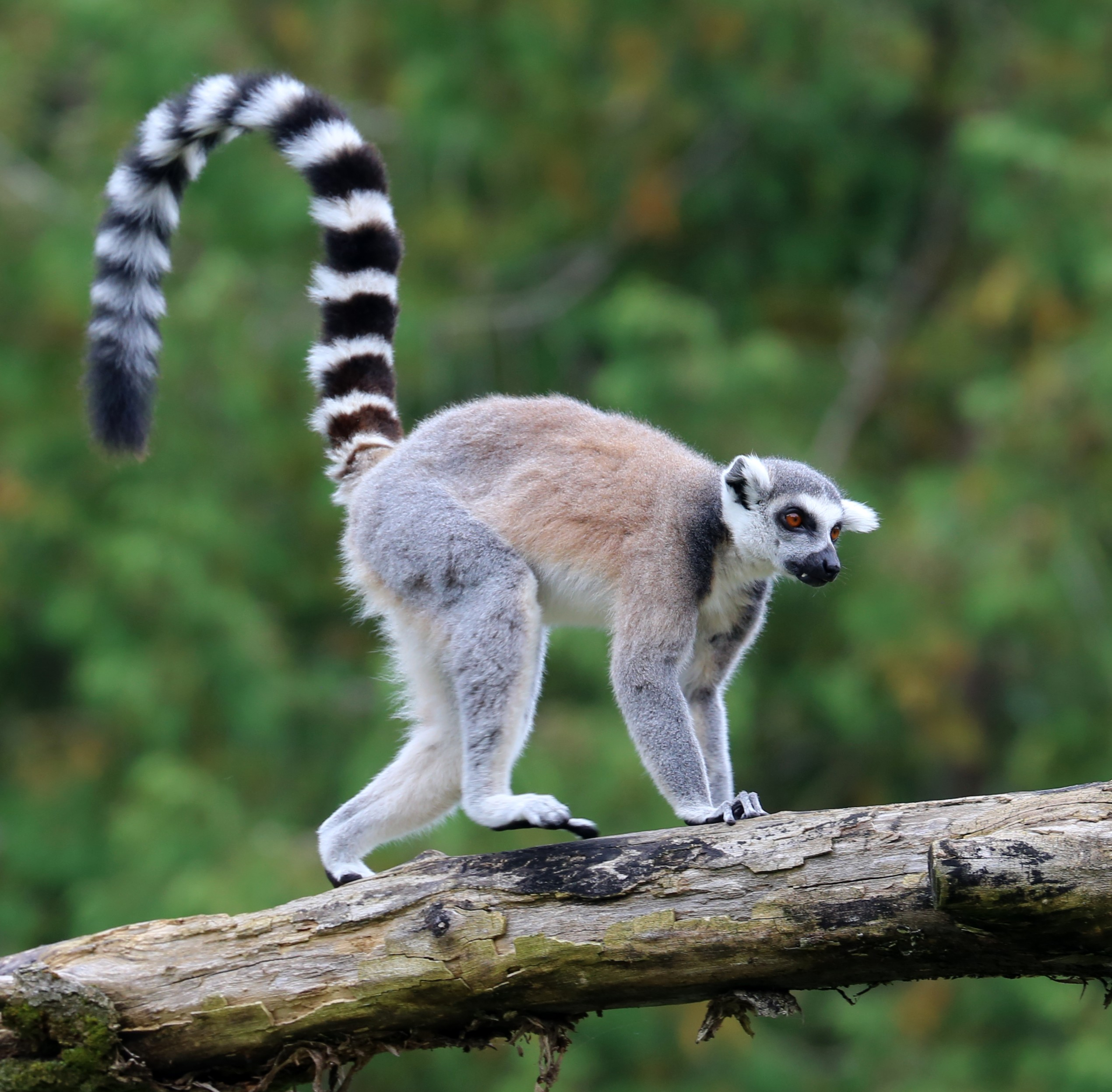 Kattas, Lemur catta, Zoo Augsburg